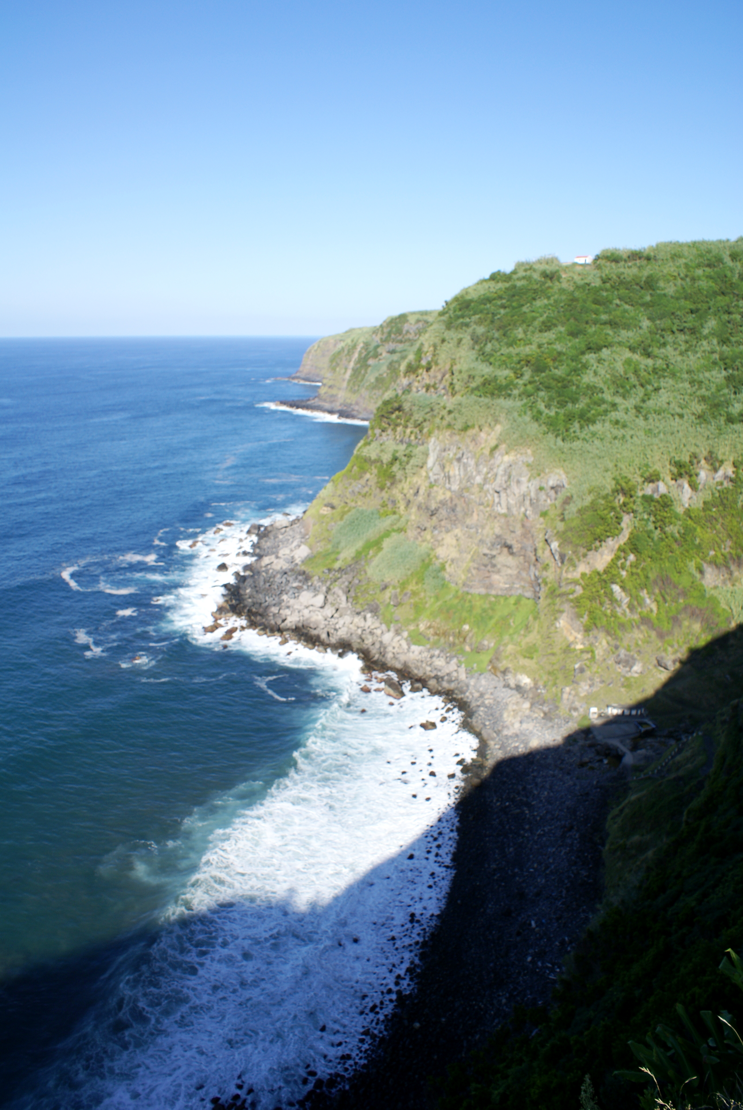 Miradouro da Pedra dos Estorninhos, Nordeste, ilha de São Miguel, Açores